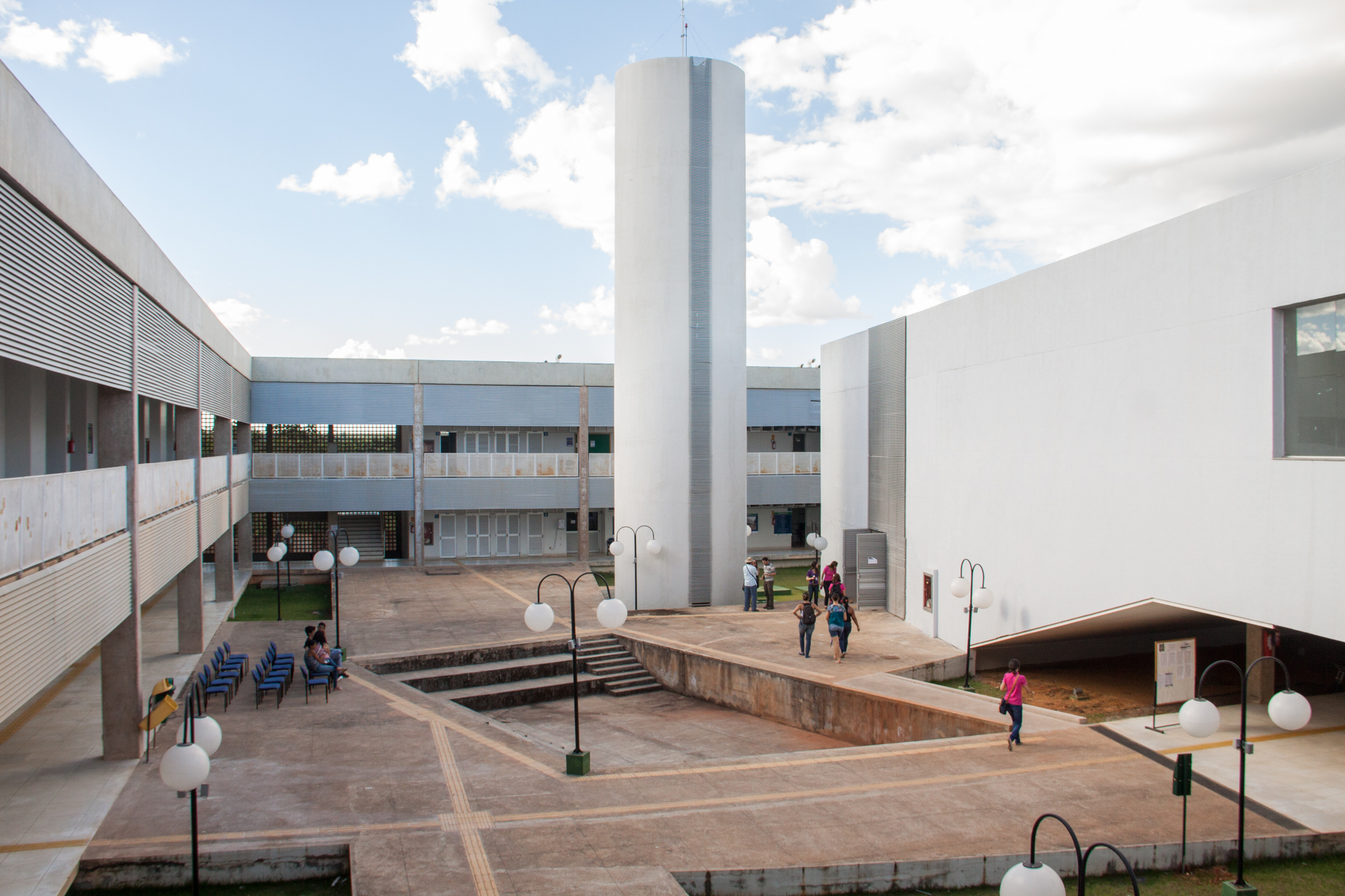 Foto: Mariana Costa